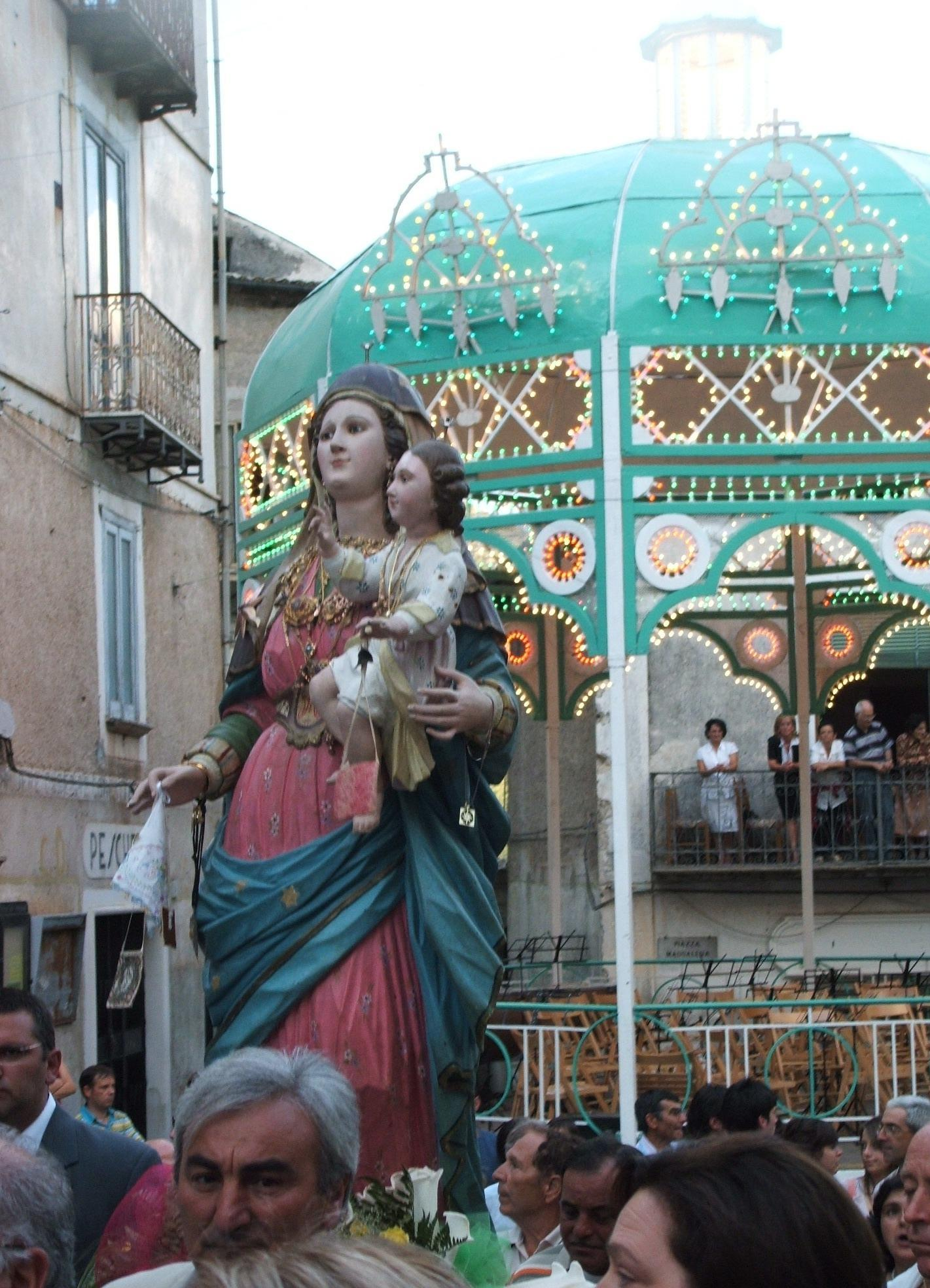 foto scattata dall'utente Marco.bellizzi; FESTA DELLA VERGINE DEL CARMELO - Morano Calabro (luglio 2008)